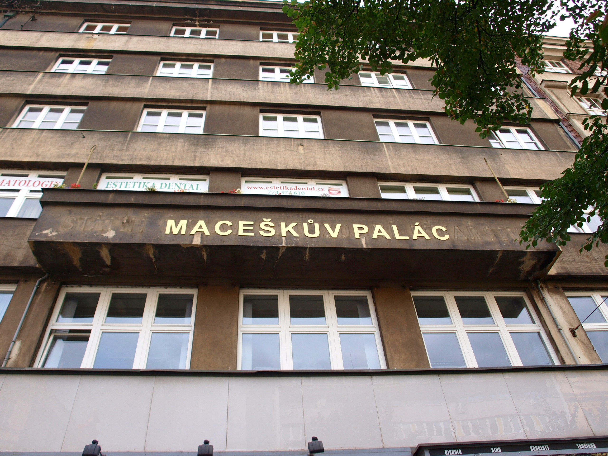 Maceškův palác